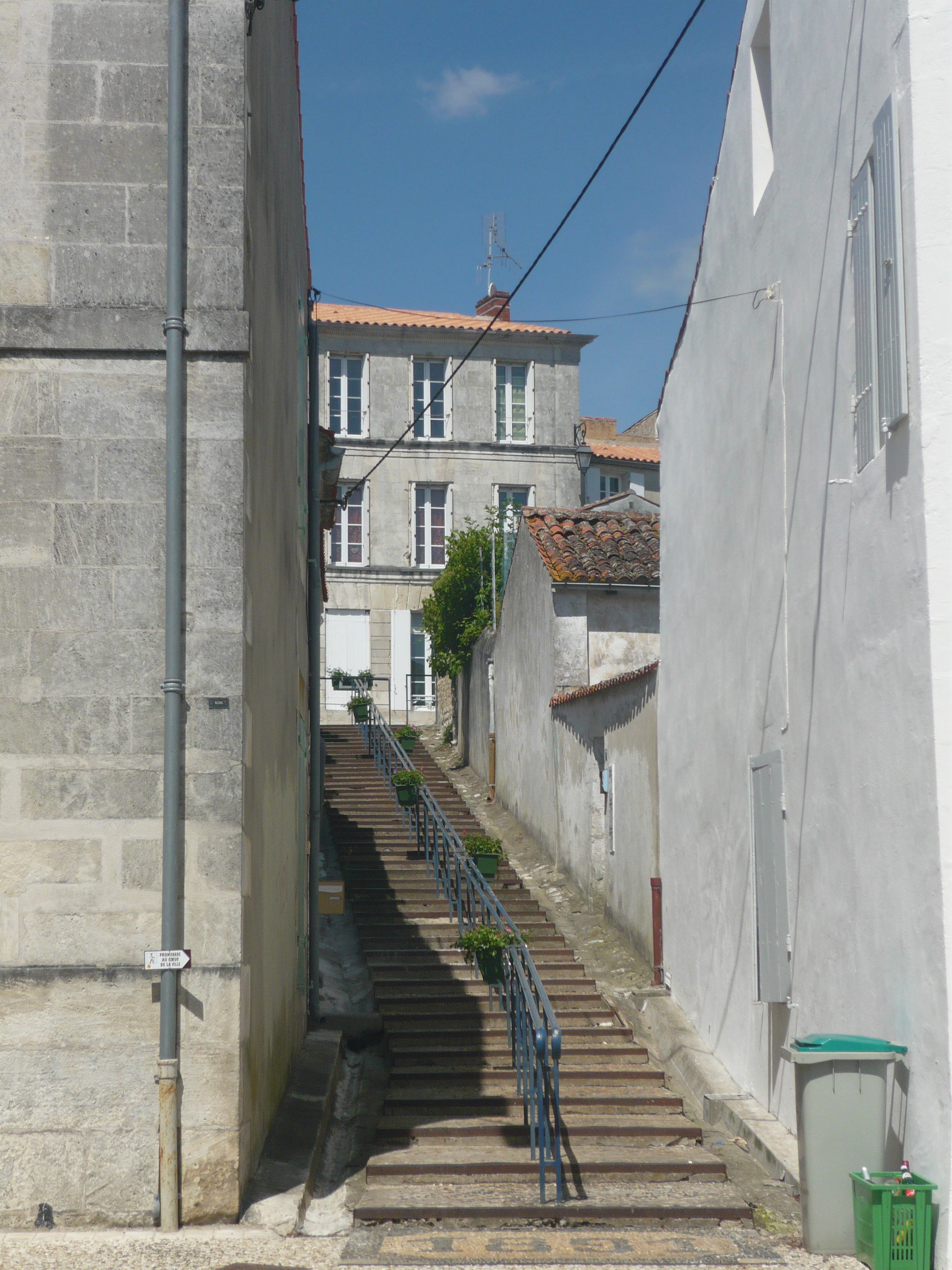 Une ruelle du centre-ville de Tonnay-Charente (Charente-Maritime).